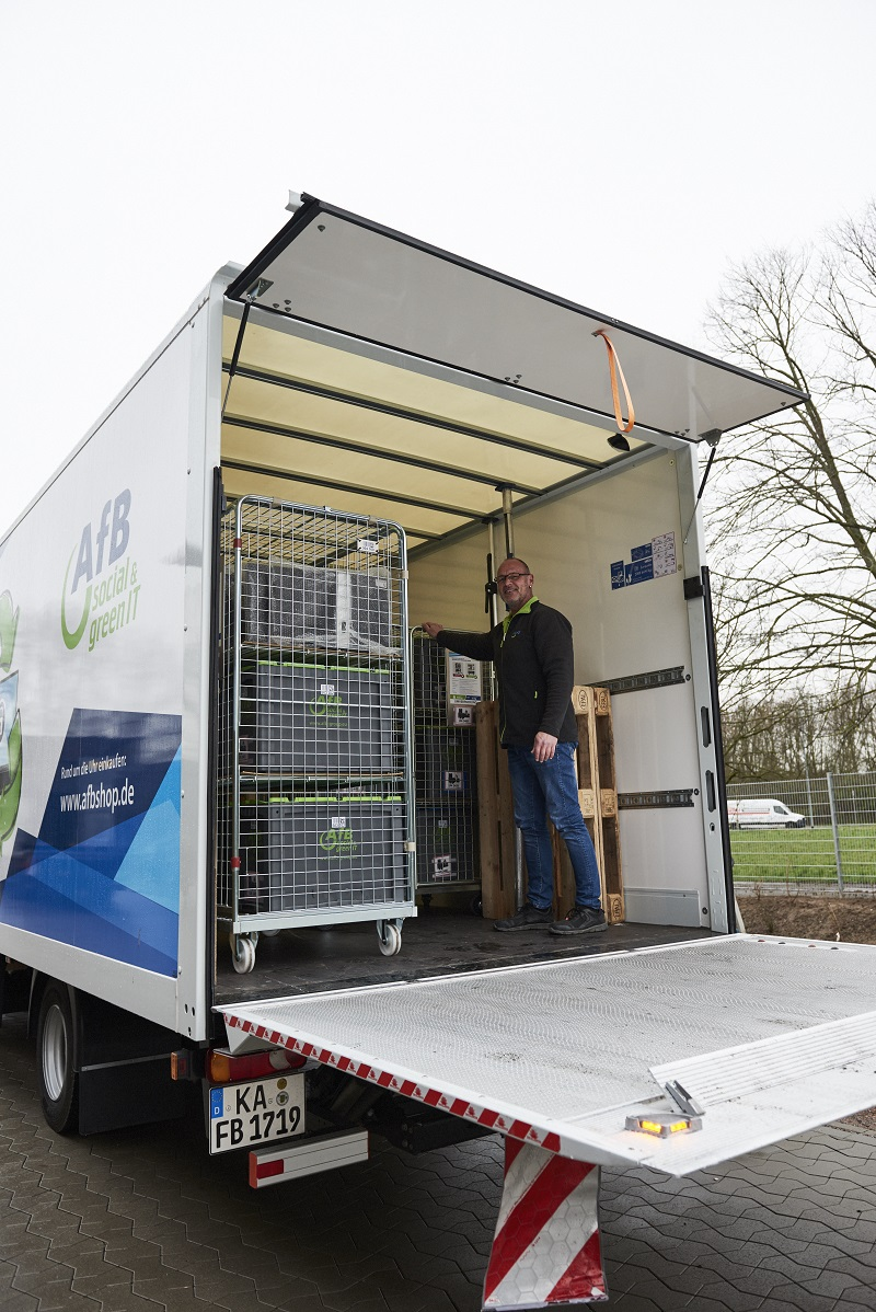 AfB gemeinnützige GmbH holt die Hardware von den Partnerbetrieben ab um sie aufzubereiten oder fachgerecht zu entsorgen.